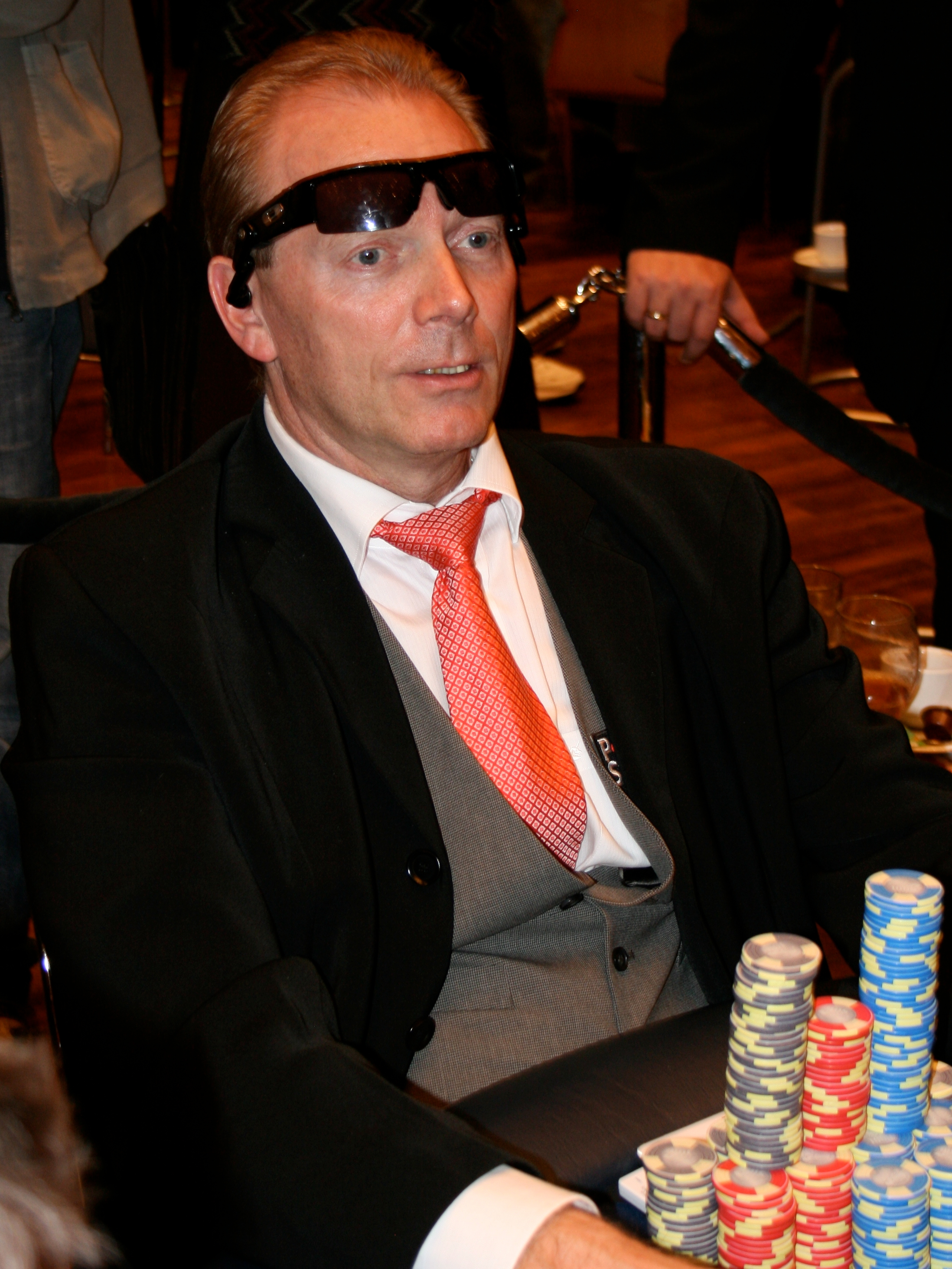 Marcel Lüske bei der EPT Dortmund 2008